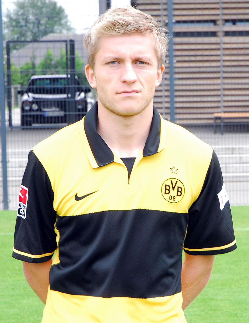 Jakub Błaszczykowski bei der Mannschaftsvorstellung 2007